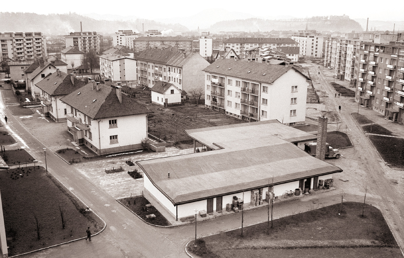 Savsko naselje v Ljubljani